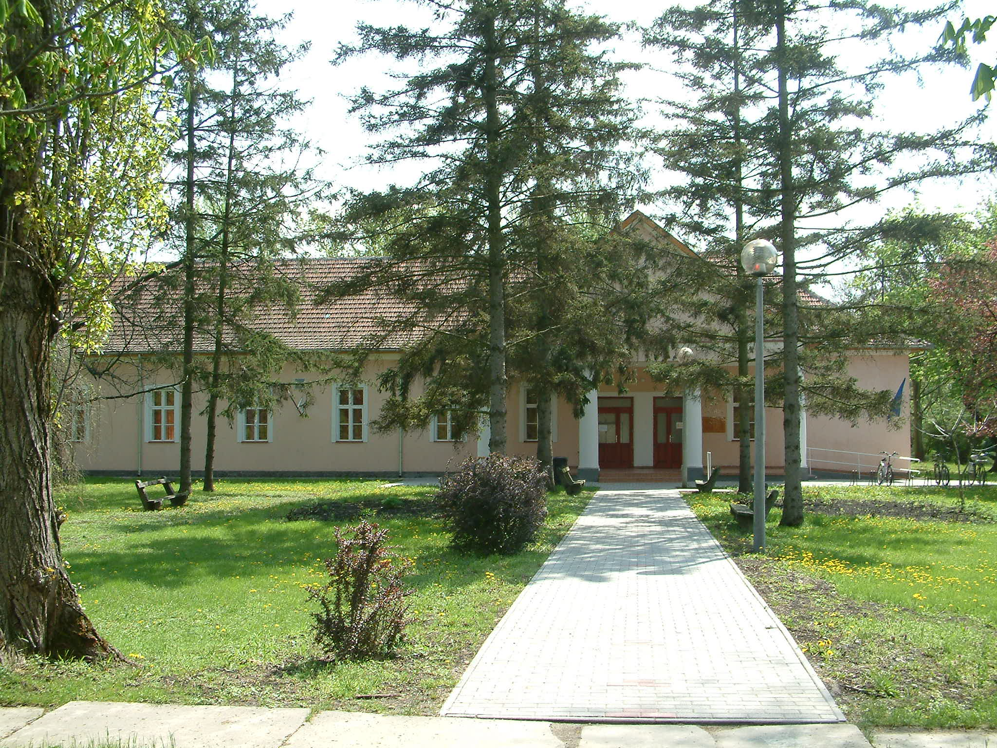 Kultúrház